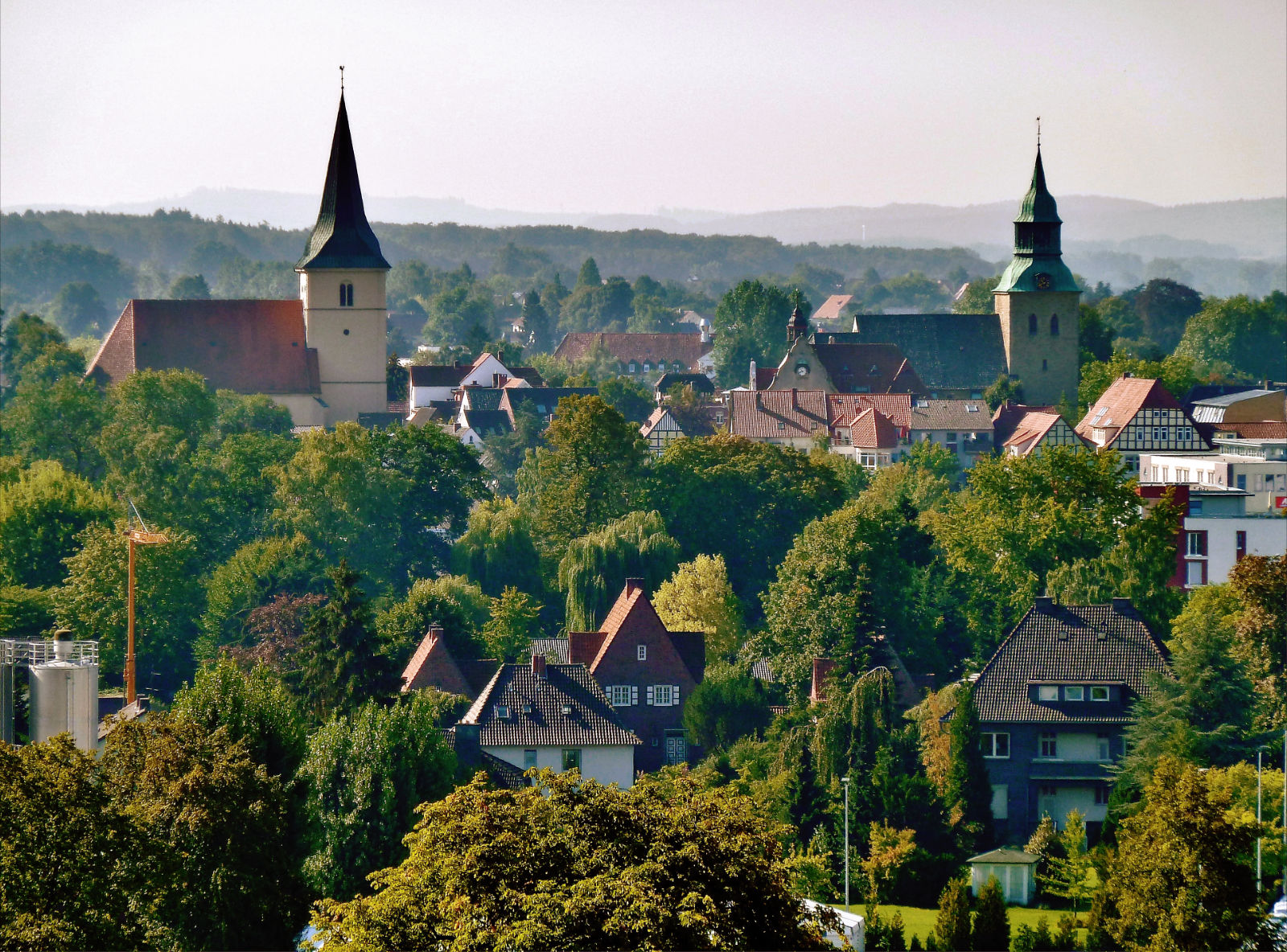 Blick auf das Zentrum der Stadt Melle vom "Meller Berg" (Wiehengebirge)